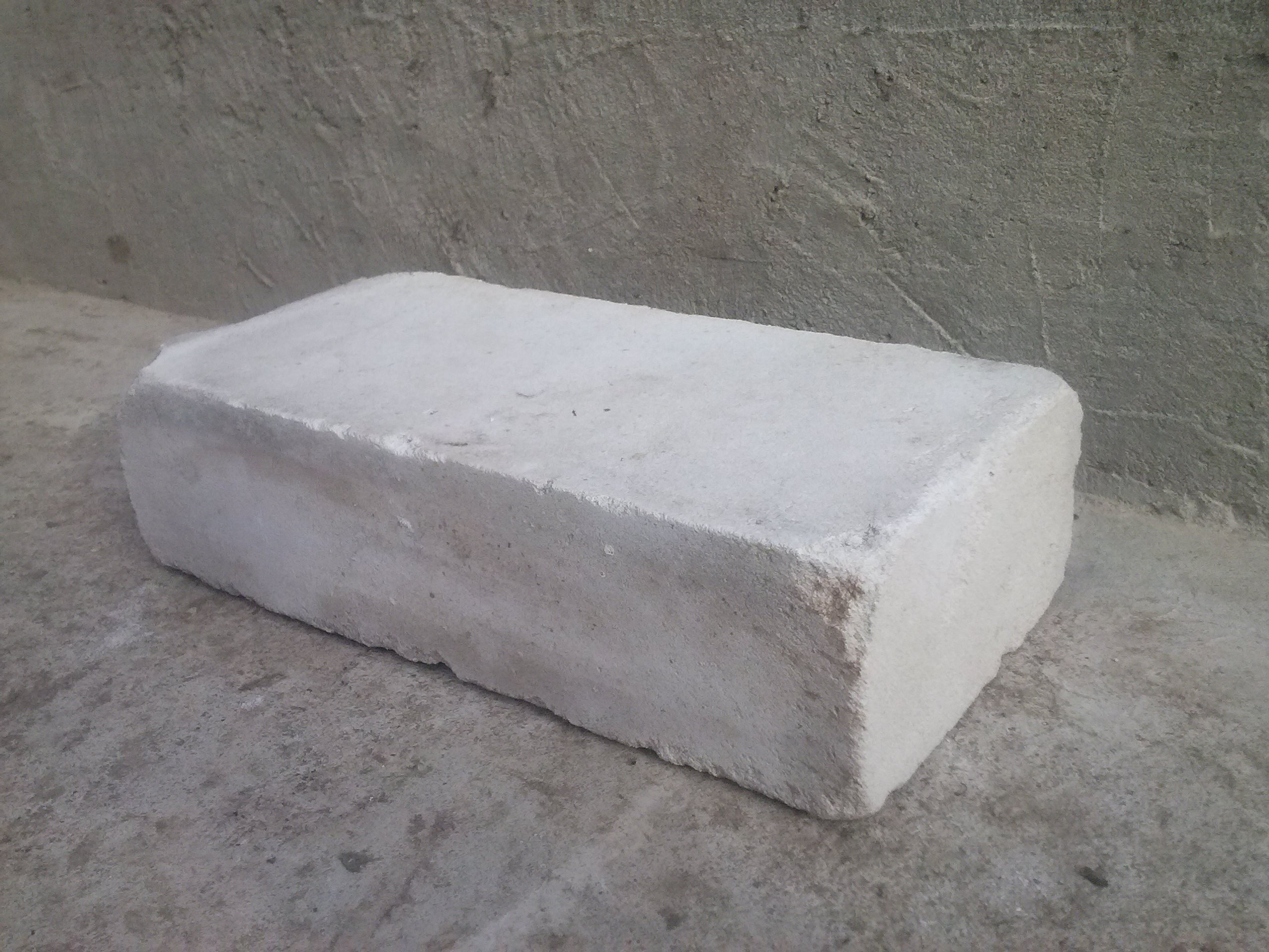 Cegła silikatowa (wapienno-piaskowa) o wymiarach 250x12x6,5